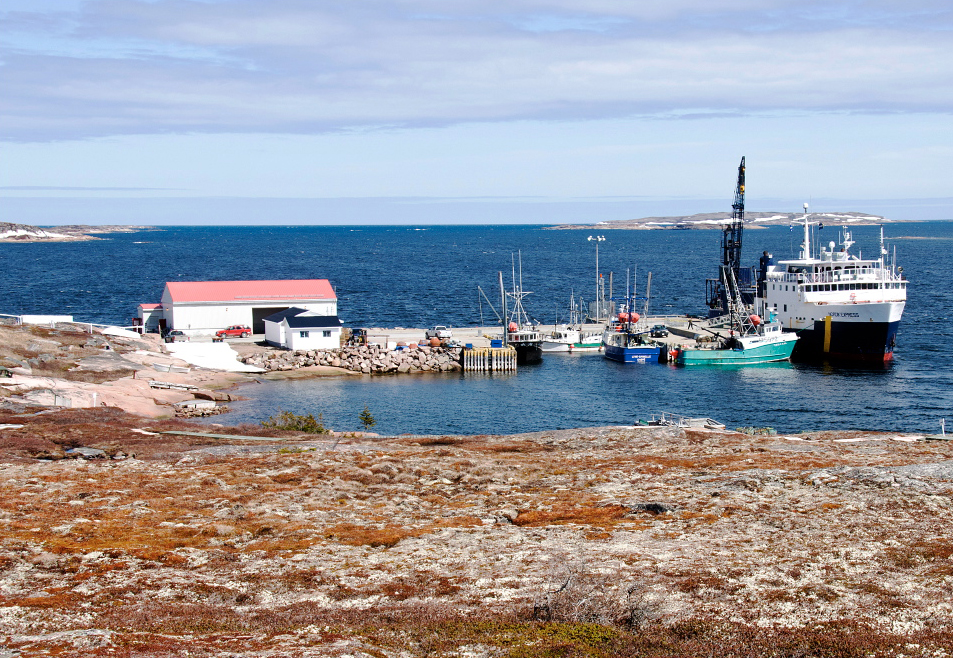 Quai de Tête-à-la-Baleine